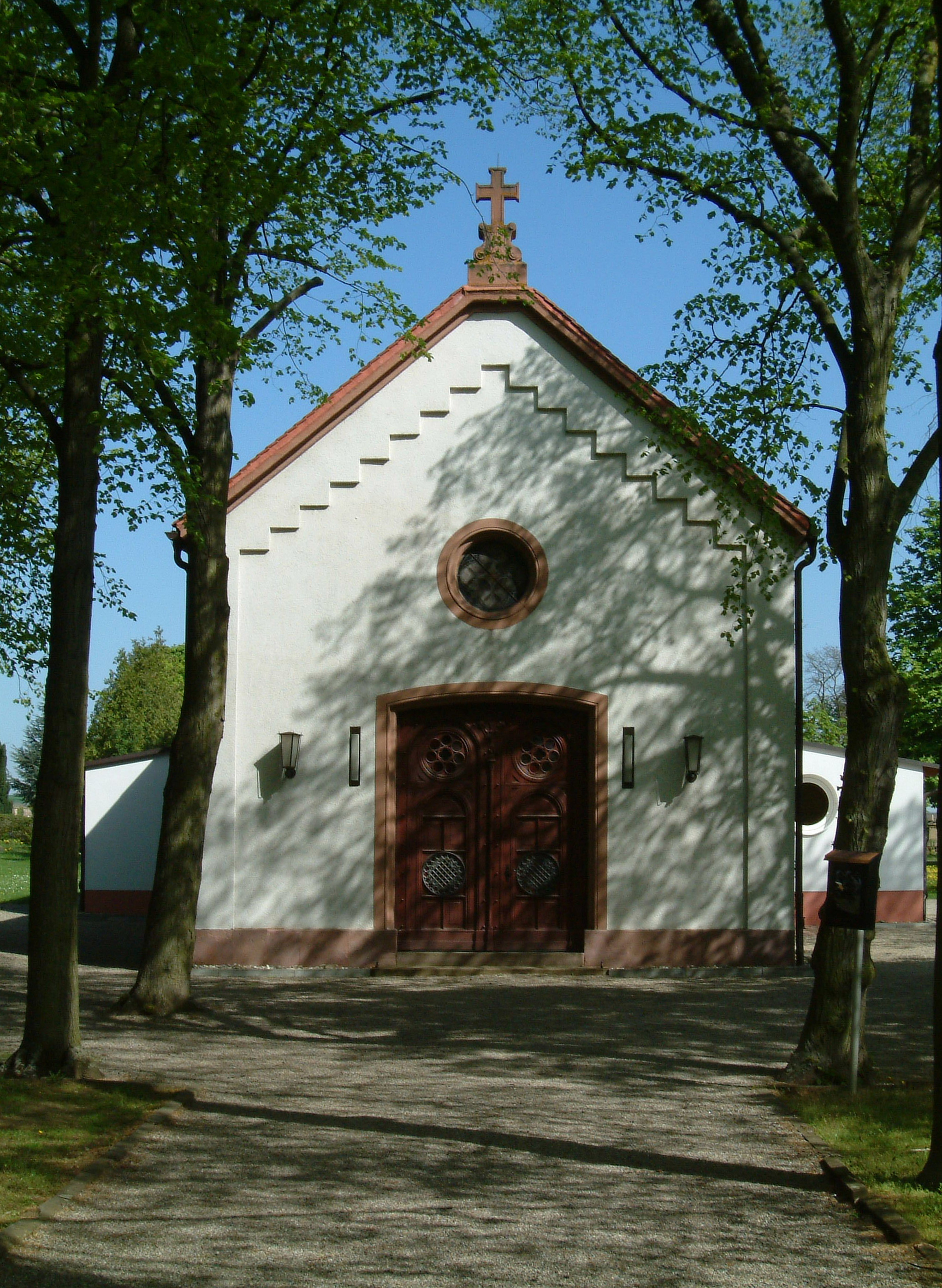 Friedhofskapelle zu Dirmstein, selbst fotografiert am 28.04.2006 und freigegeben durch Benutzer:Mundartpoet